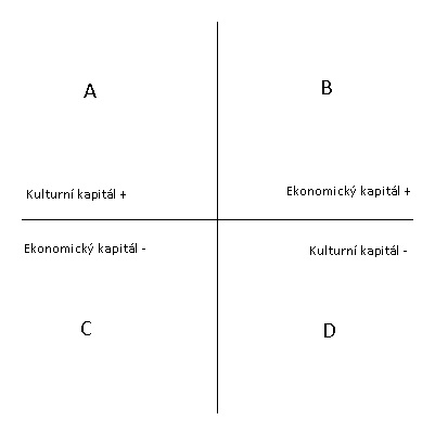 Graf sociálního prostoru p. Bourdieua